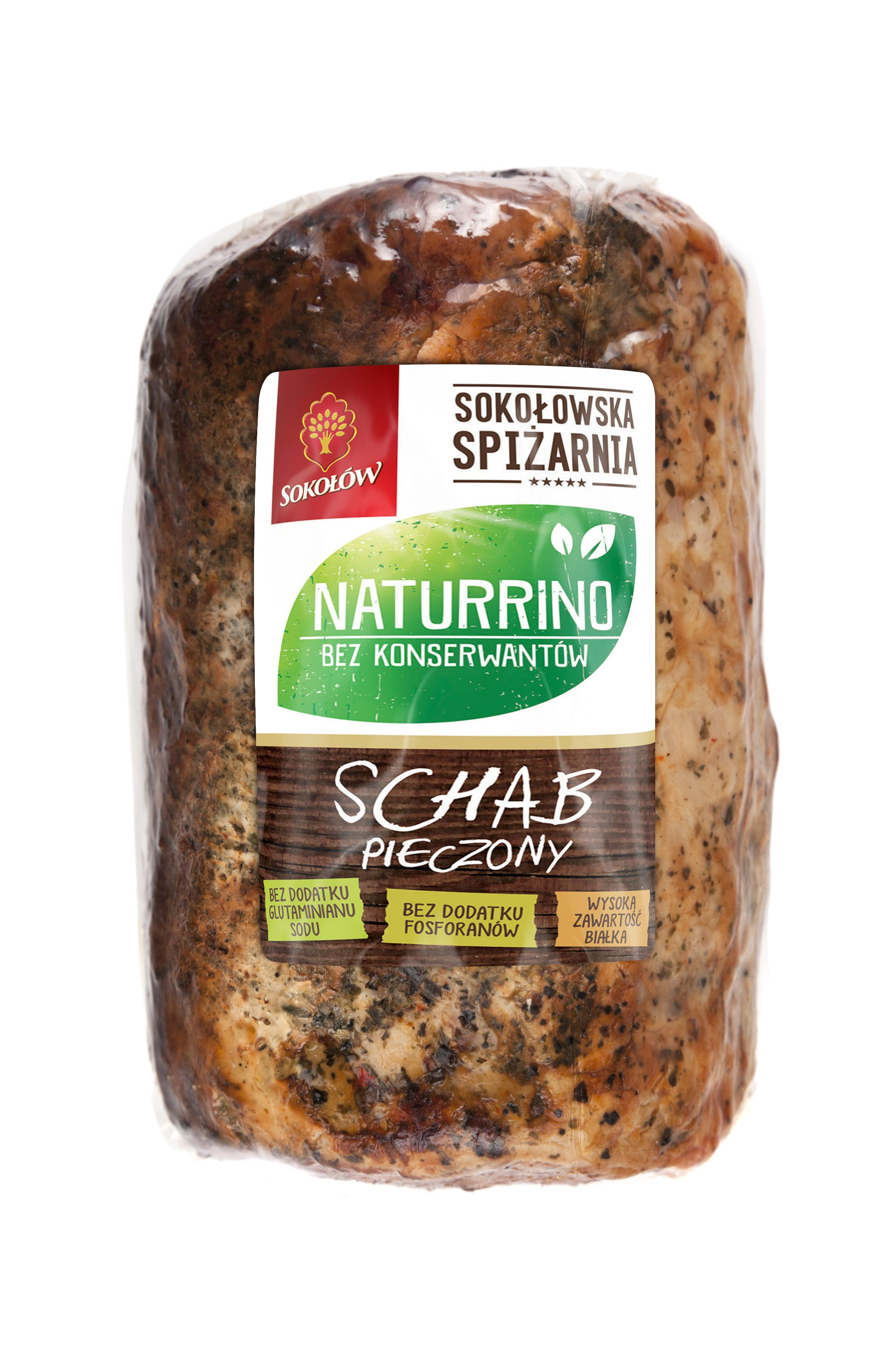 Sokołów S.A. Schab Pieczony Naturrino